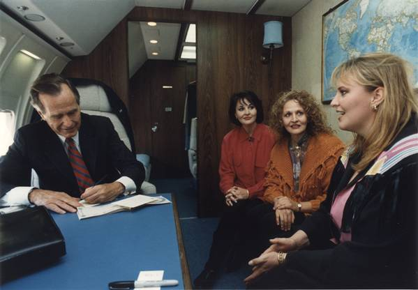 Forrester Sisters